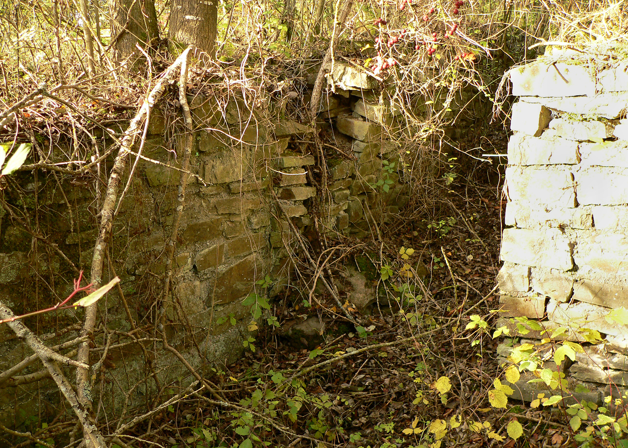 Römischer Gutshof „Im Weiler“